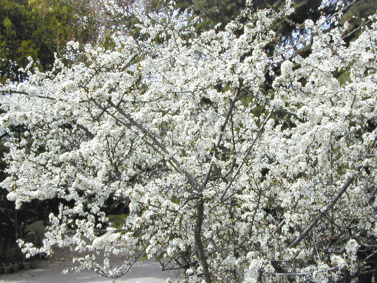 Prunus spinosa. Real Jardín Botánico, Madrid.